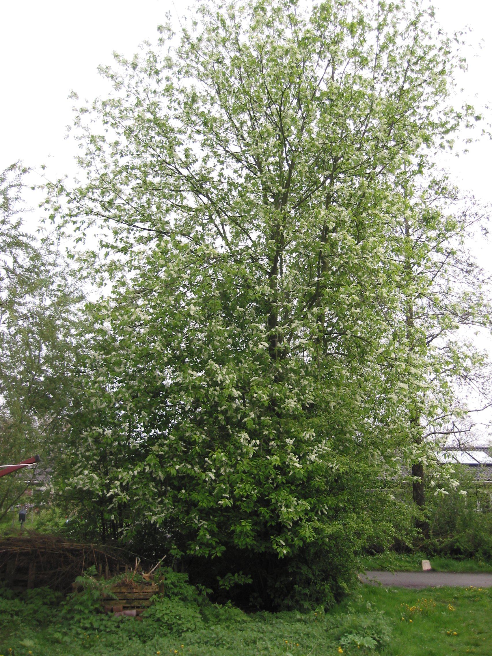 Prunus padus (Vogelkers)